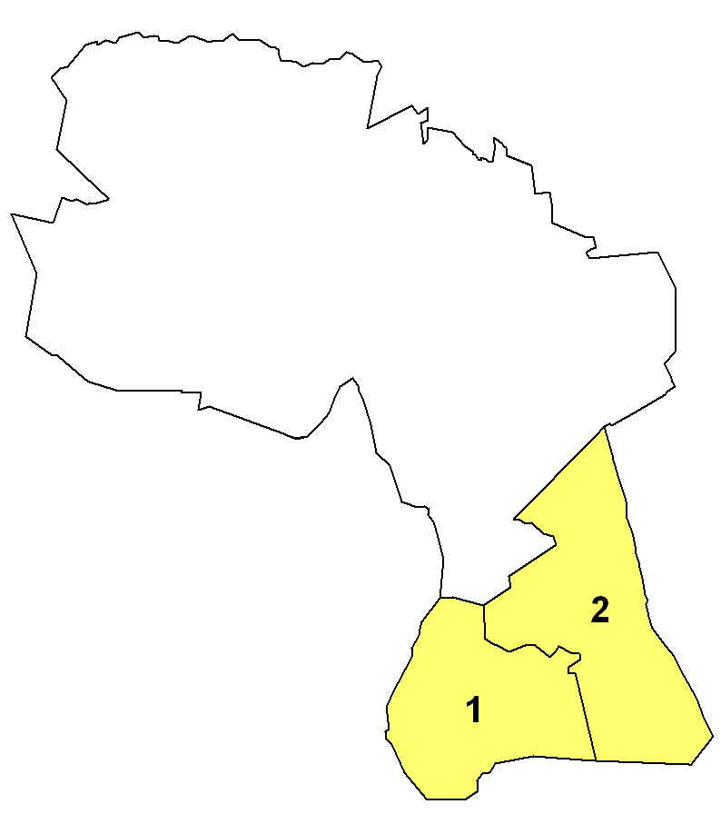 Landkarte der Obergrafschaft der Grafschaft Bentheim